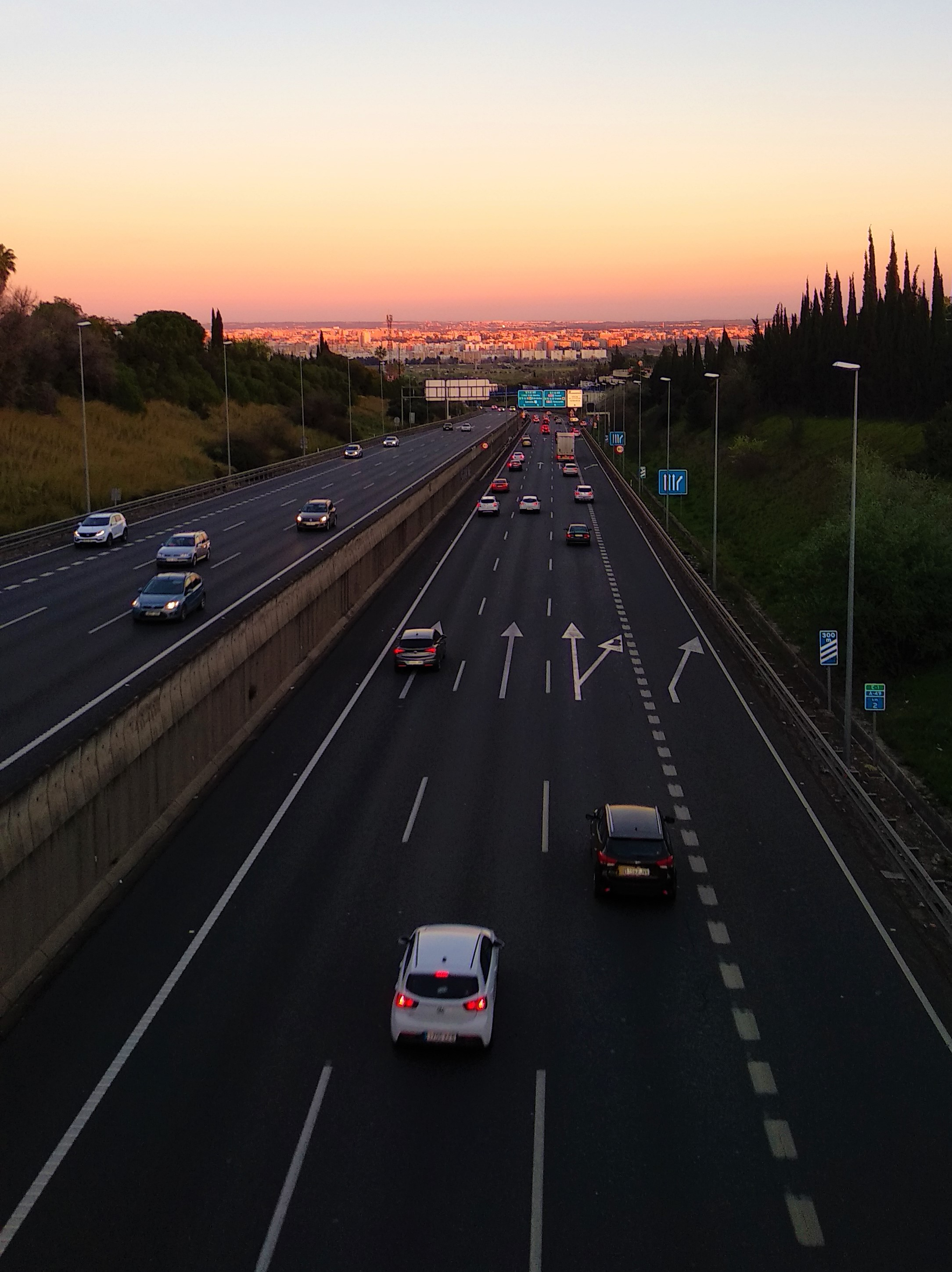 Autovía A-49 sentido Sevilla desde el puente que comunica Tomares y Castilleja de la Cuesta